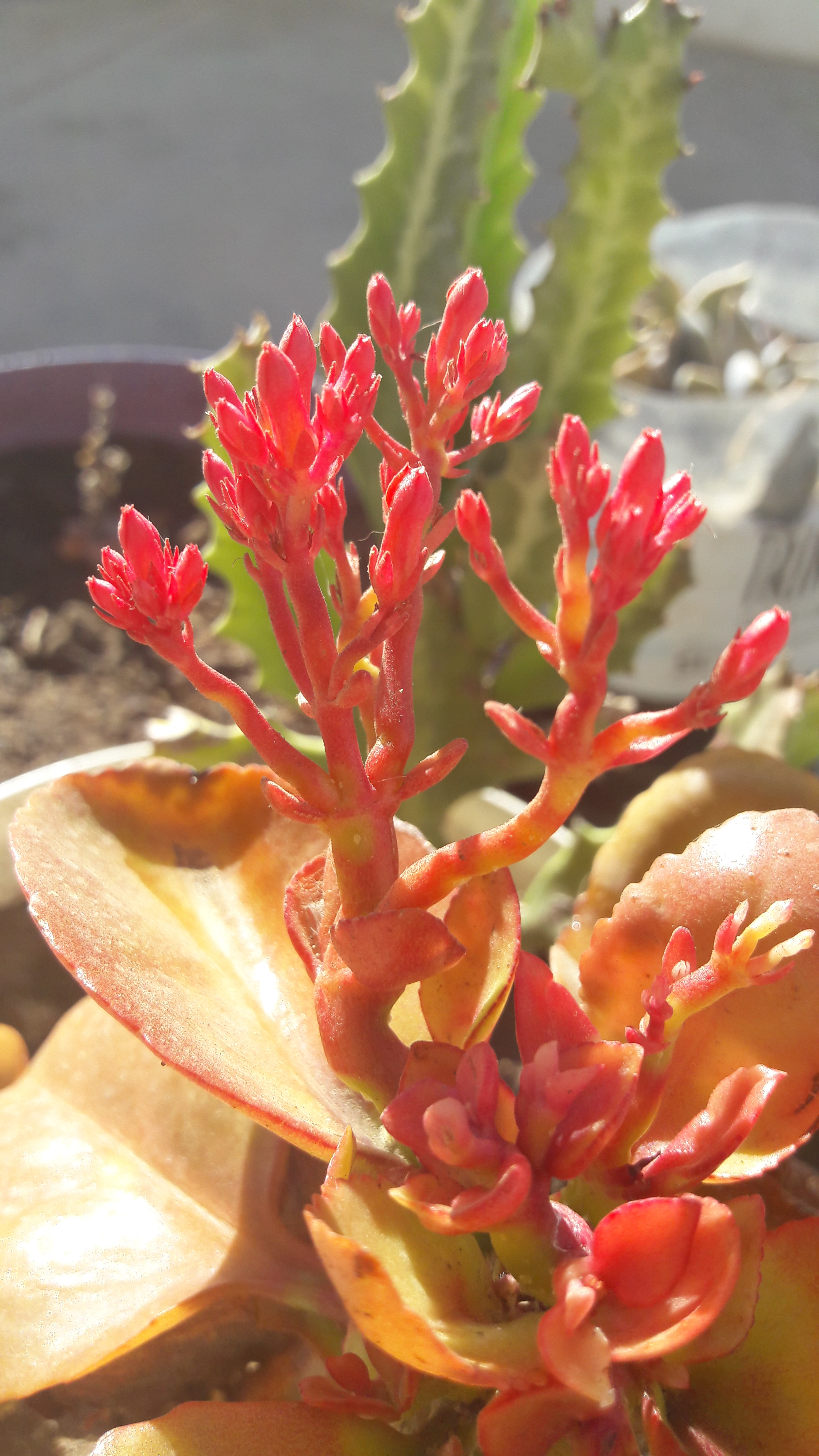 Kslanchoe rossa